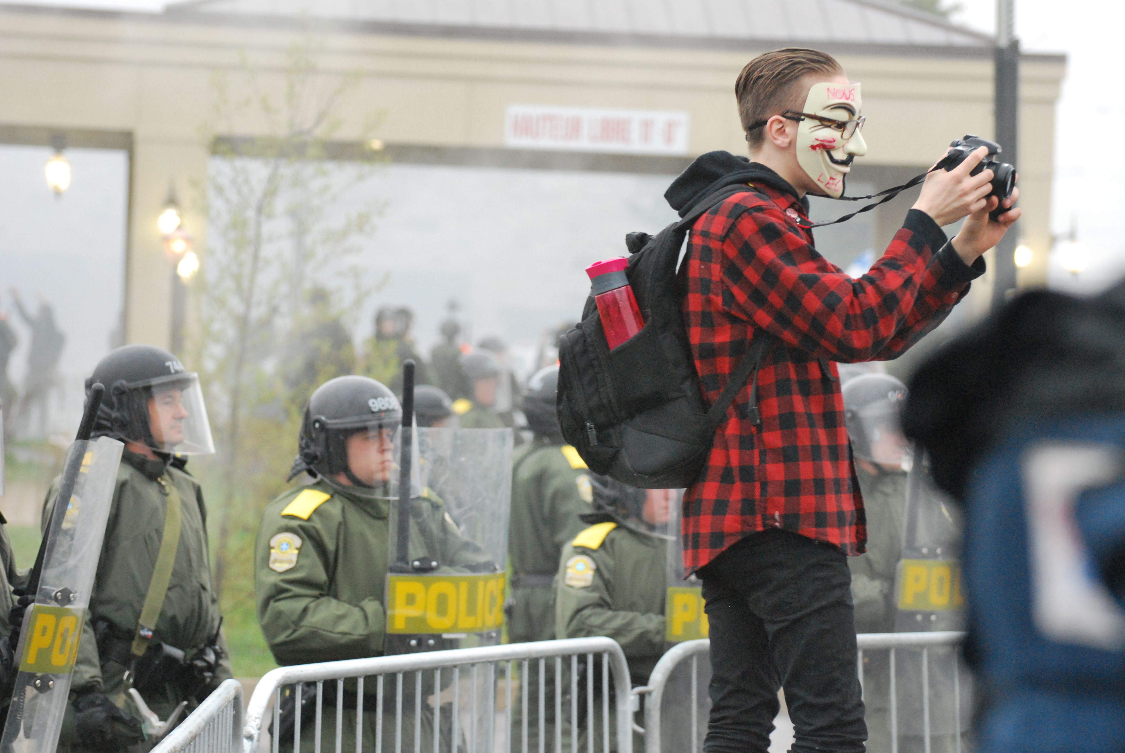 Manifestation à Victoriaville contre le Parti libéral du Québec.